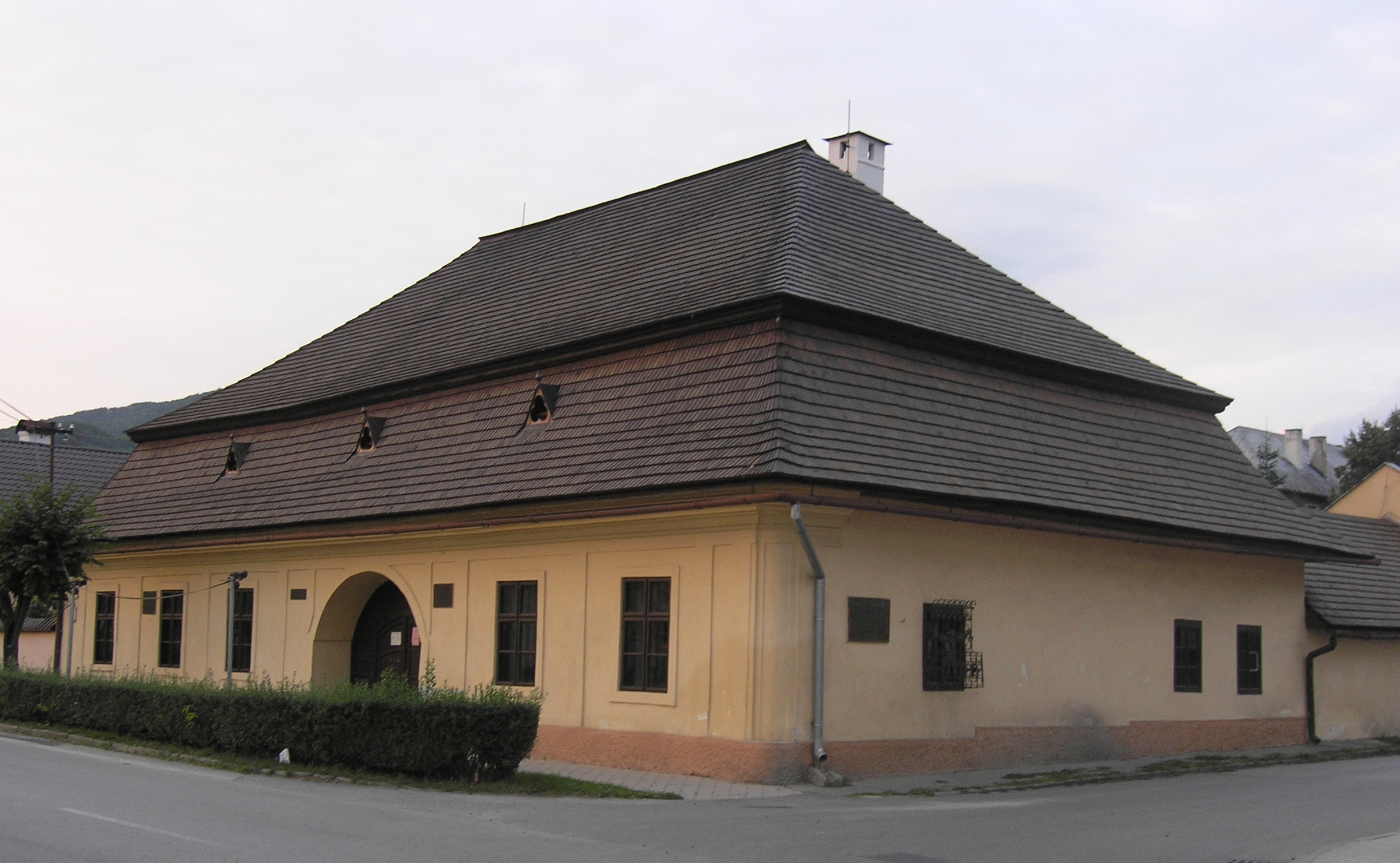 Budova slovenského gymnázia